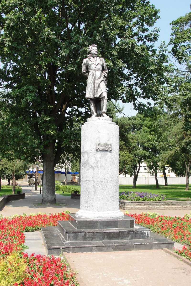 Памятник Пушкину